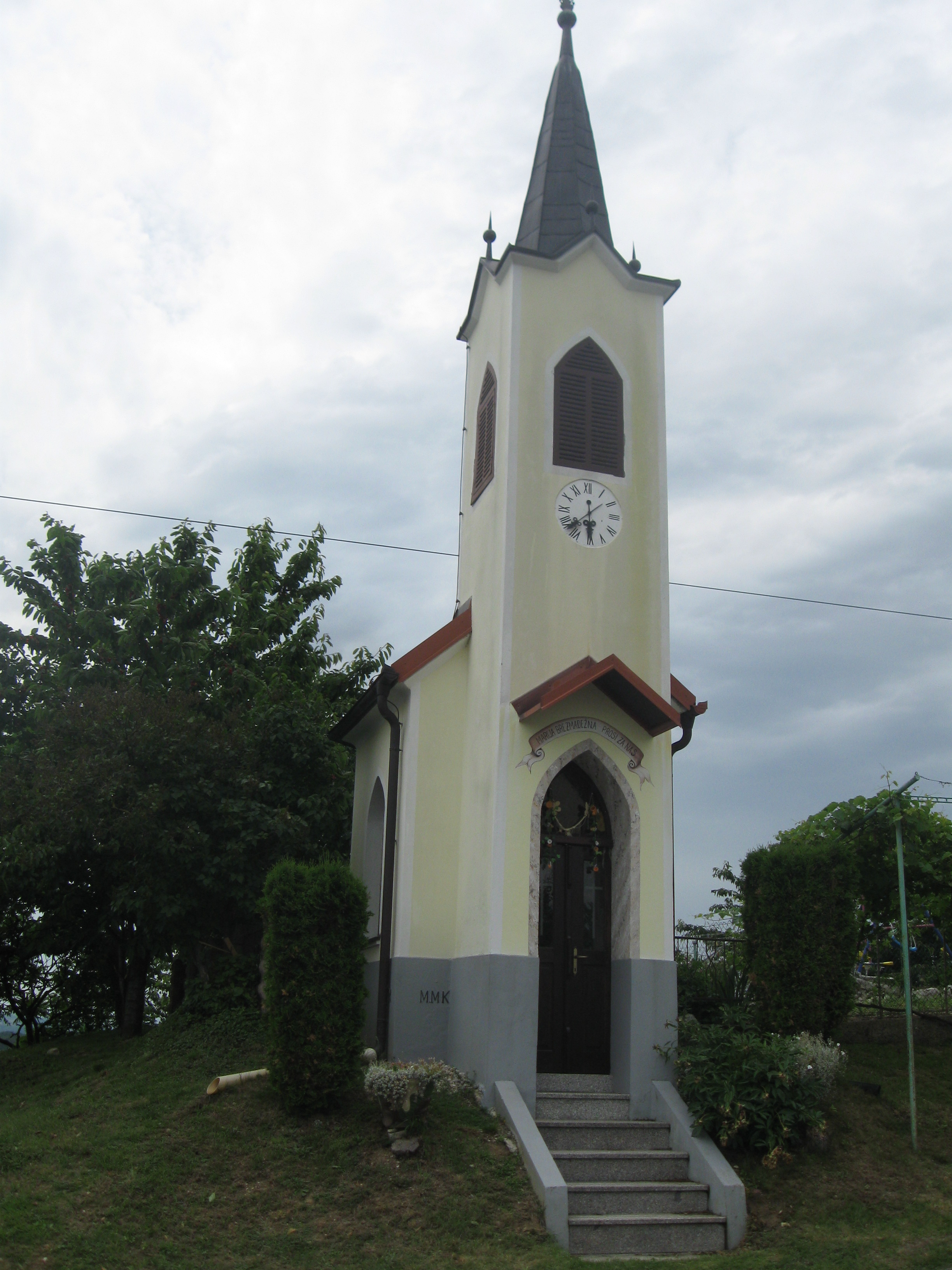 Kapela iz leta 1920 z visokim zvonikom in šilasto zaključenimi vrati in okni. Kapela stoji zraven hiše Cenkova št. 11. Vpisana v register nepremične kulturne dediščine pod št. 24595.